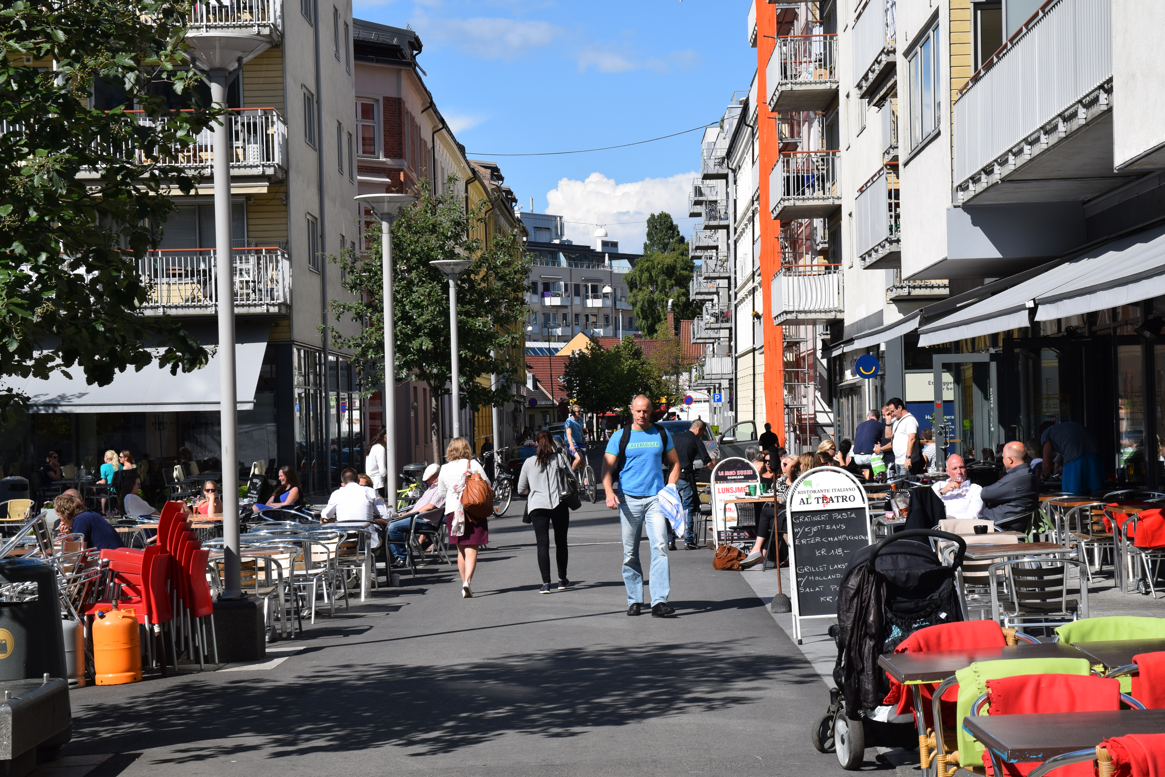 Mandalls gate, Grønland, Oslo seen from Teaterplassen